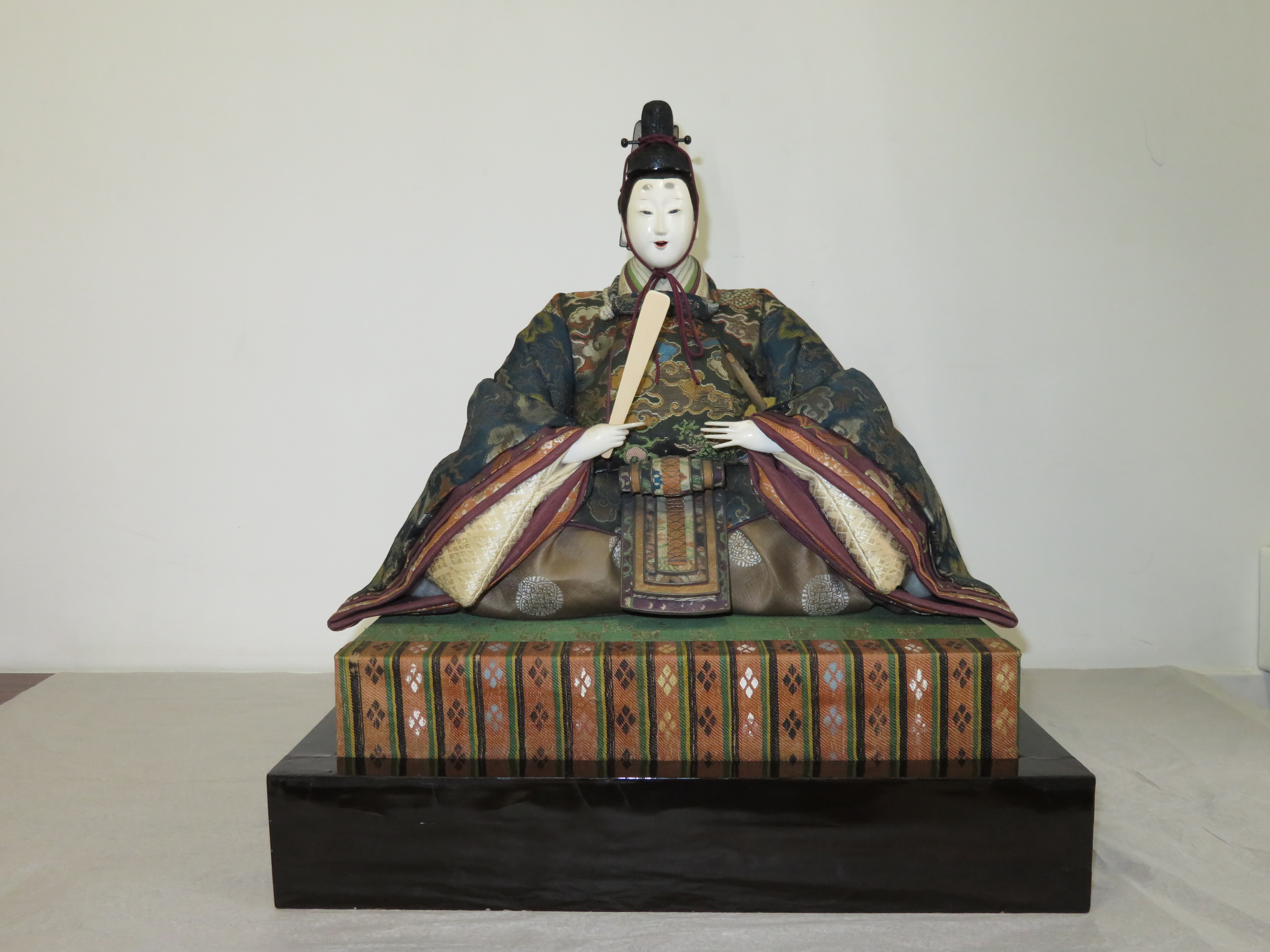 2018年2月27日-3月18日 東京国立博物館展示風景